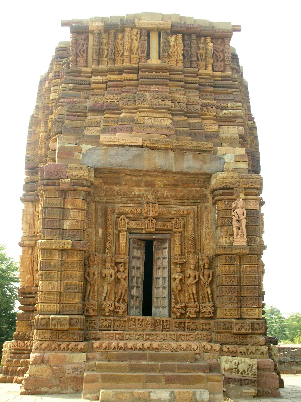 janjagir temple Chhatisgarh, India